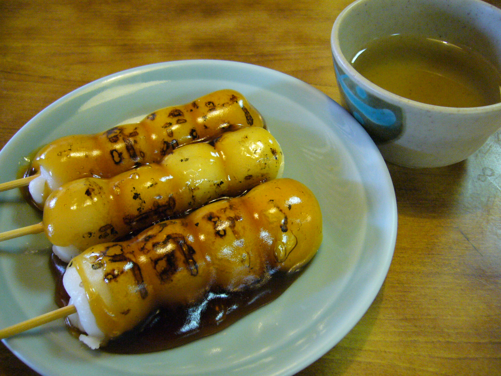 mitarashi-dango,katori-city,japan